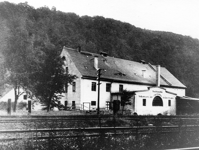 Original image description from the Deutsche Fotothek Freital- Coßmannsdorf. Pastritzmühle, aus: Die Egermühle Deuben 1876-1926